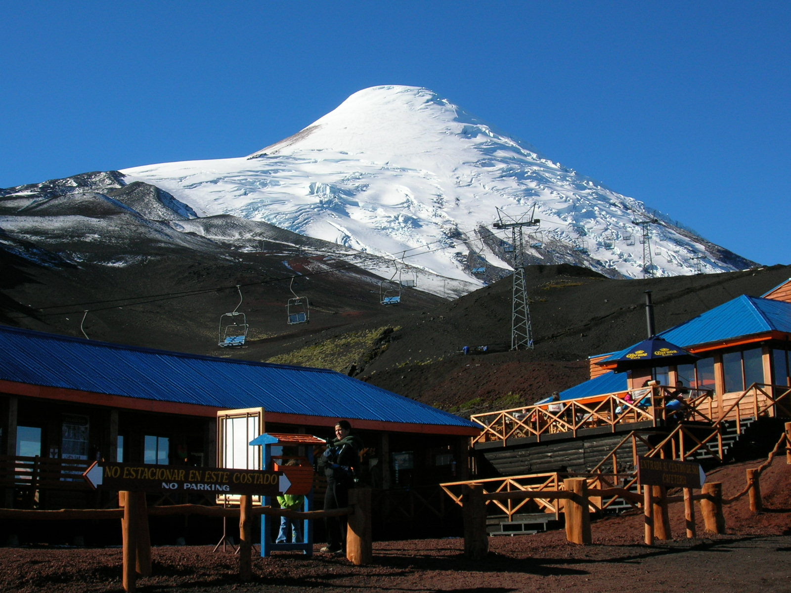 Centro de ski y montaña Volcán Osorno, Puerto Varas - Chile. En invierno es un centro de ski en el borde del Lago Llanquihue y con una hermosa vista hacia él, en verano los andariveles permiten subir al volcán, que se convierte en un gran mirador hacia el lago y hacia el paisaje de pampas verdes del entorno del lago.